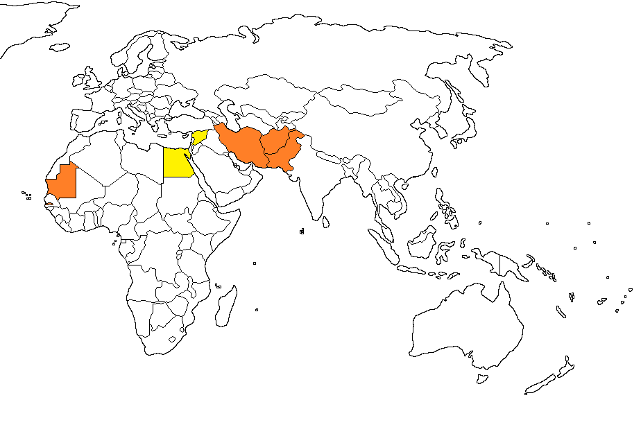 Repúblicas islamicas y Repúblicas árabes República islamica República árabe